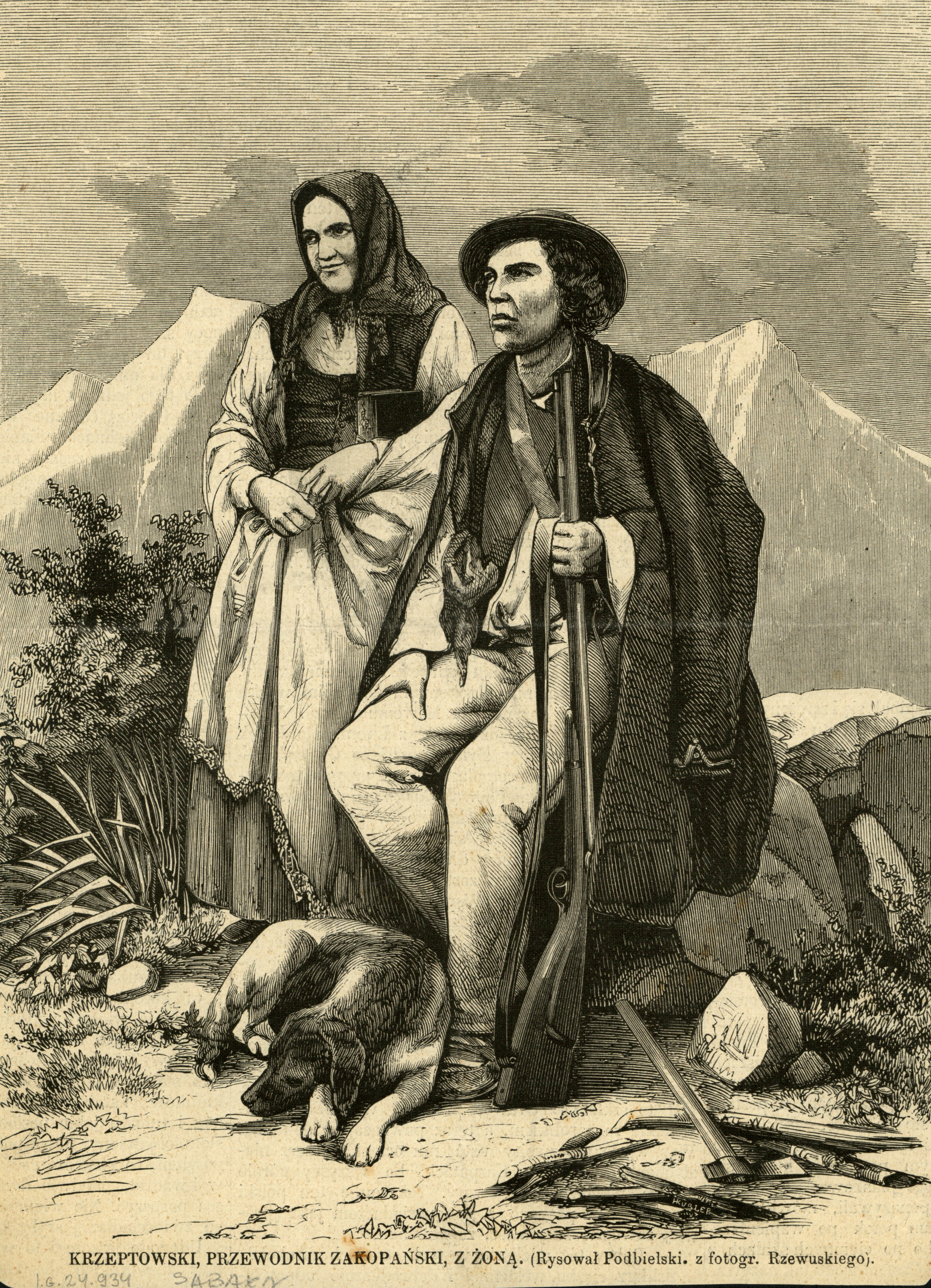 Krzeptowski (Sabała), przewodnik zakopiański, z żoną. Ryc. z: "Tygodnik ilustrowany" 1862, nr 161 s. 164. Drzewor. wg rys. Bronisława Podbielskiego, na podstawie fotografii Walerego Rzewuskiego.